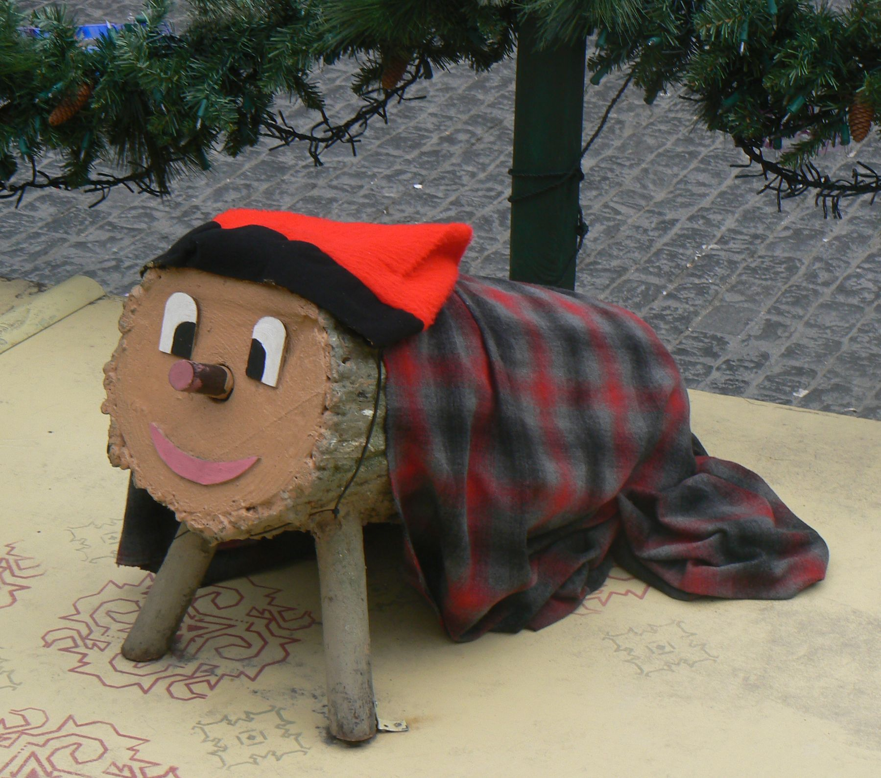 Un tió de Nadal exposat a la plaça de Sant Jaume de Barcelona al Nadal de 2010-2011. El pessebre d'aquest any representa un menjador d'una llar catalana amb les tradicions típiques nadalenques: el tió, el pessebre, la sopa de galets, els torrons i neules, etc.